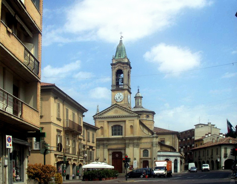 Broni, provincia di Pavia: santuario di San Contardo (Foto Luigino C.)